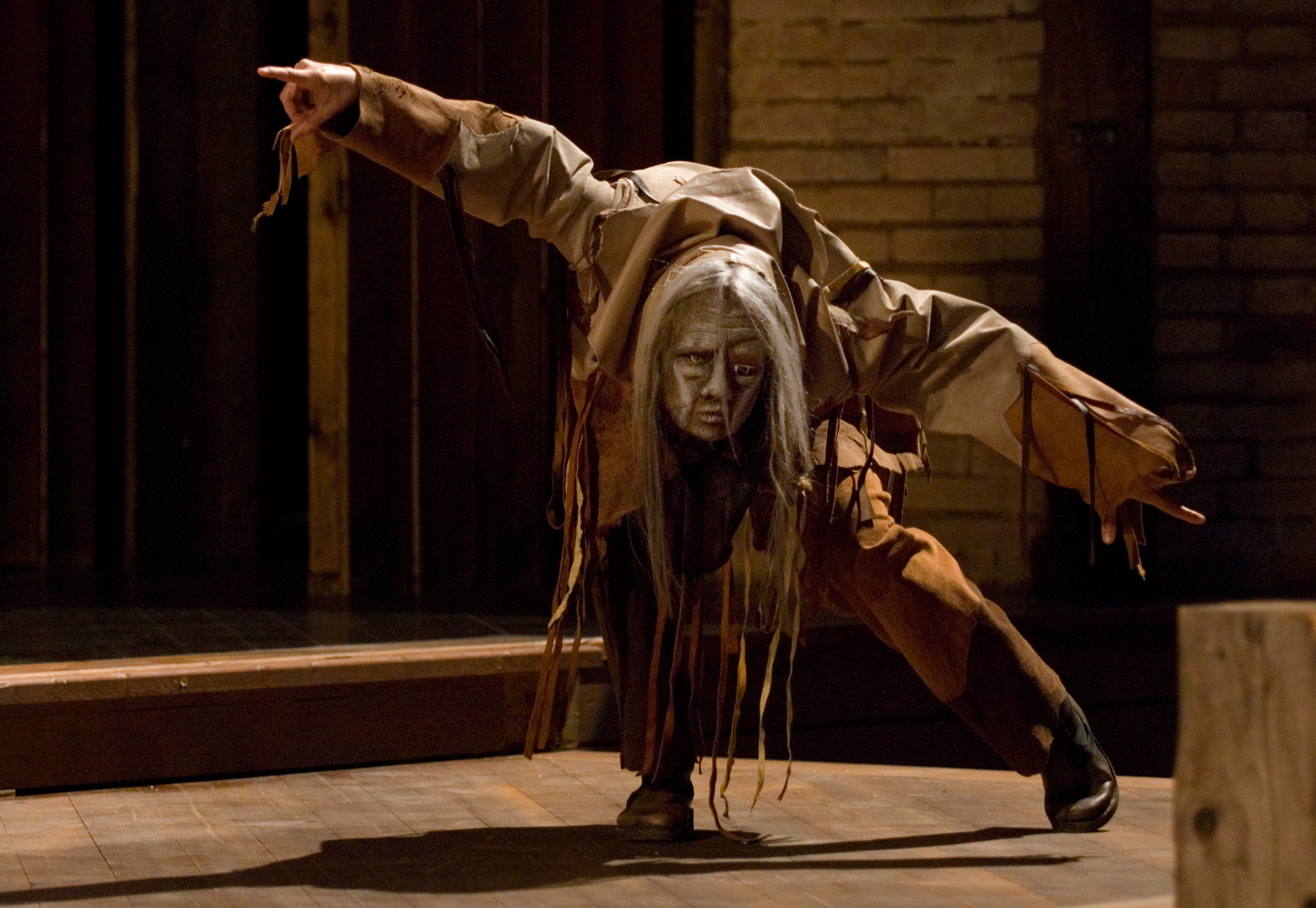 Bannlyst